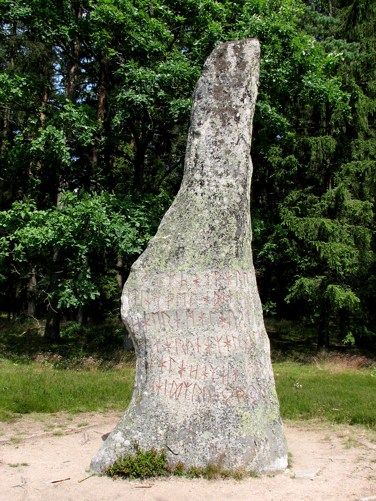 Björketorpsstenen